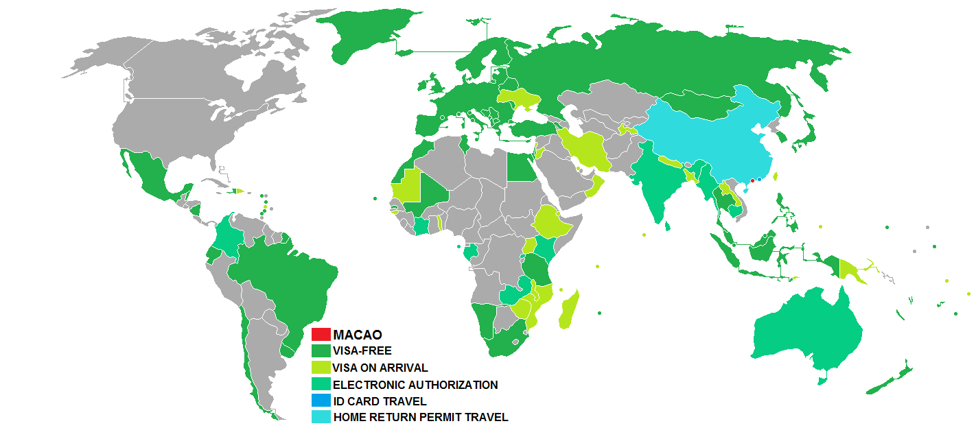 Visa requirements for Chinese citizens of Macau SAR